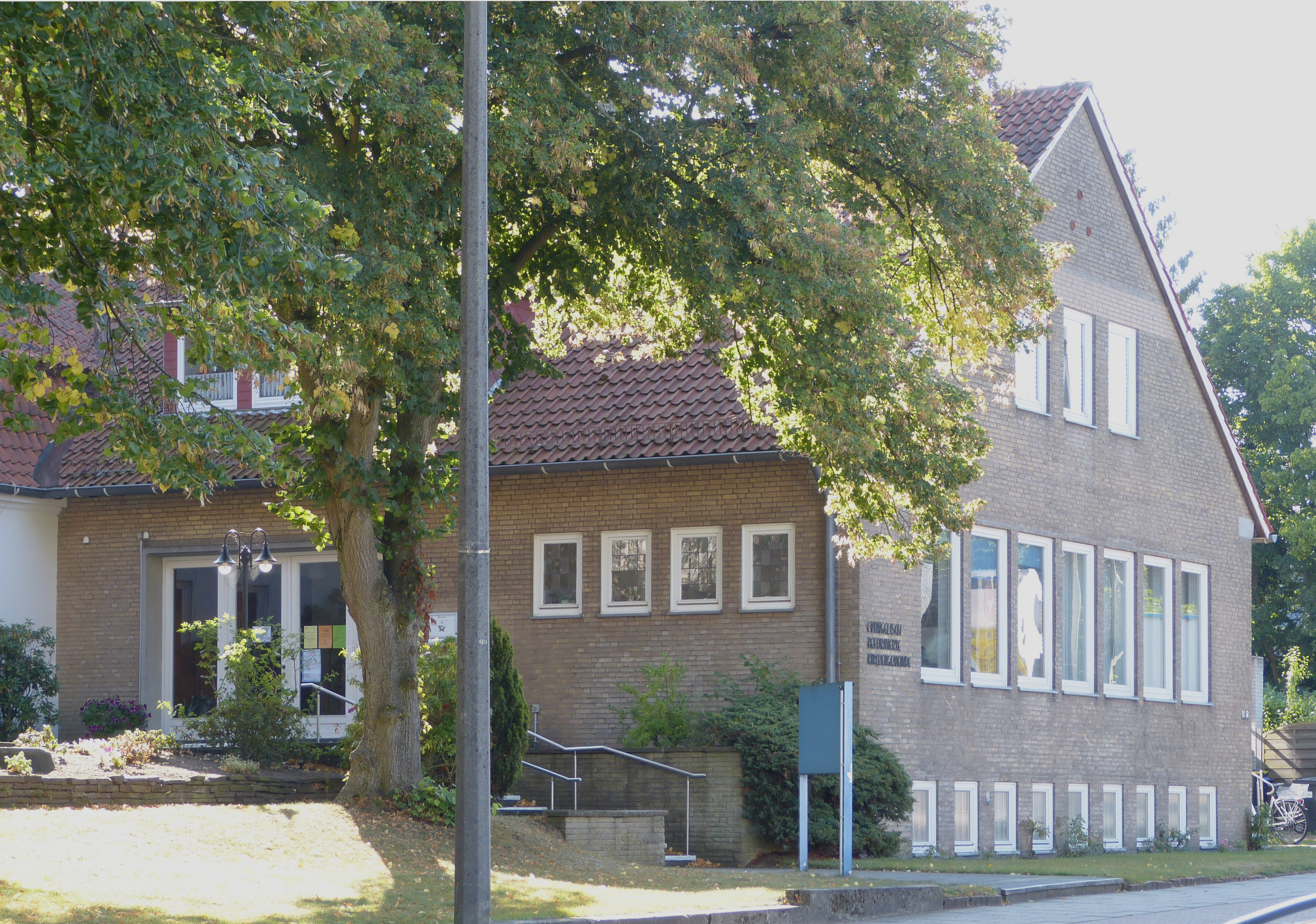 Reformierte Gemeinde Rönnebeck-Farge, Gemeindehaus in Bremen, Farger Straße 17Das abgebildete Objekt ist ein geschütztes Kulturdenkmal in der Freien Hansestadt Bremen, mit der Nr. 1508 beim Landesamt für Denkmalpflege registriert.